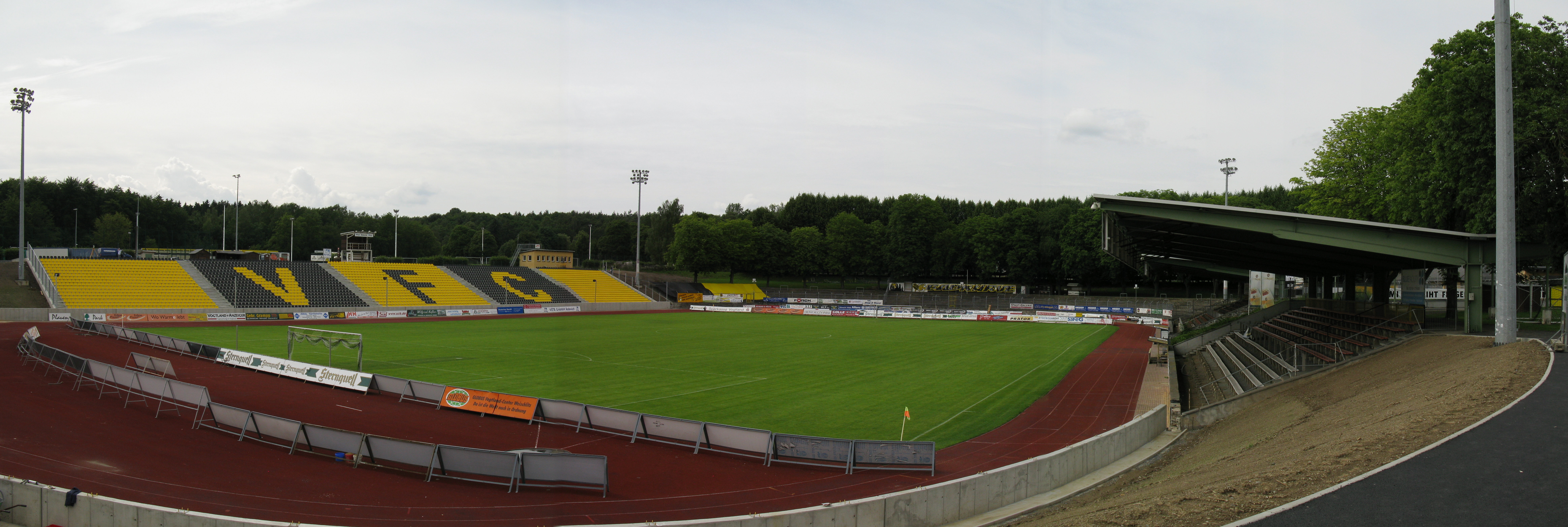 Plauen, Panorama des Vogtlandstadions nach dem Abschluss des zweiten Bauabschnitts der Sanierung. Blick von Südwesten auf die Gegengerade (links), die Nordkurve (Mitte) und die Haupttribüne (rechts).